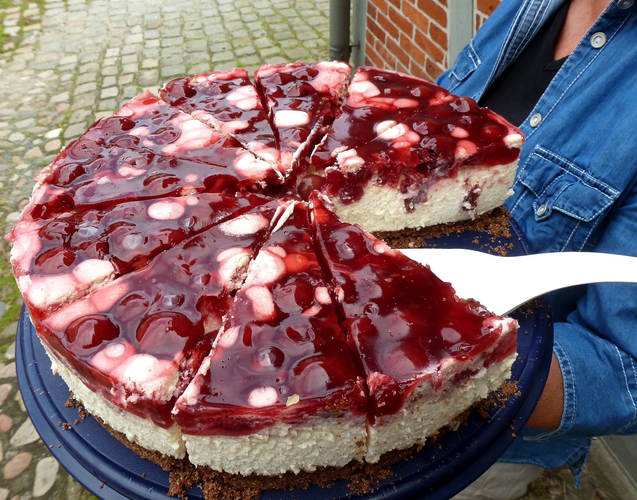 Kirsch-Käse-Sahnetorte nach Art der Wietzendorfer Landfrauen in Niedersachsen, Deutschland. Im American English and Australian English Sprachgebrauch sehr ungenau als Black Forest cake bezeichnet.